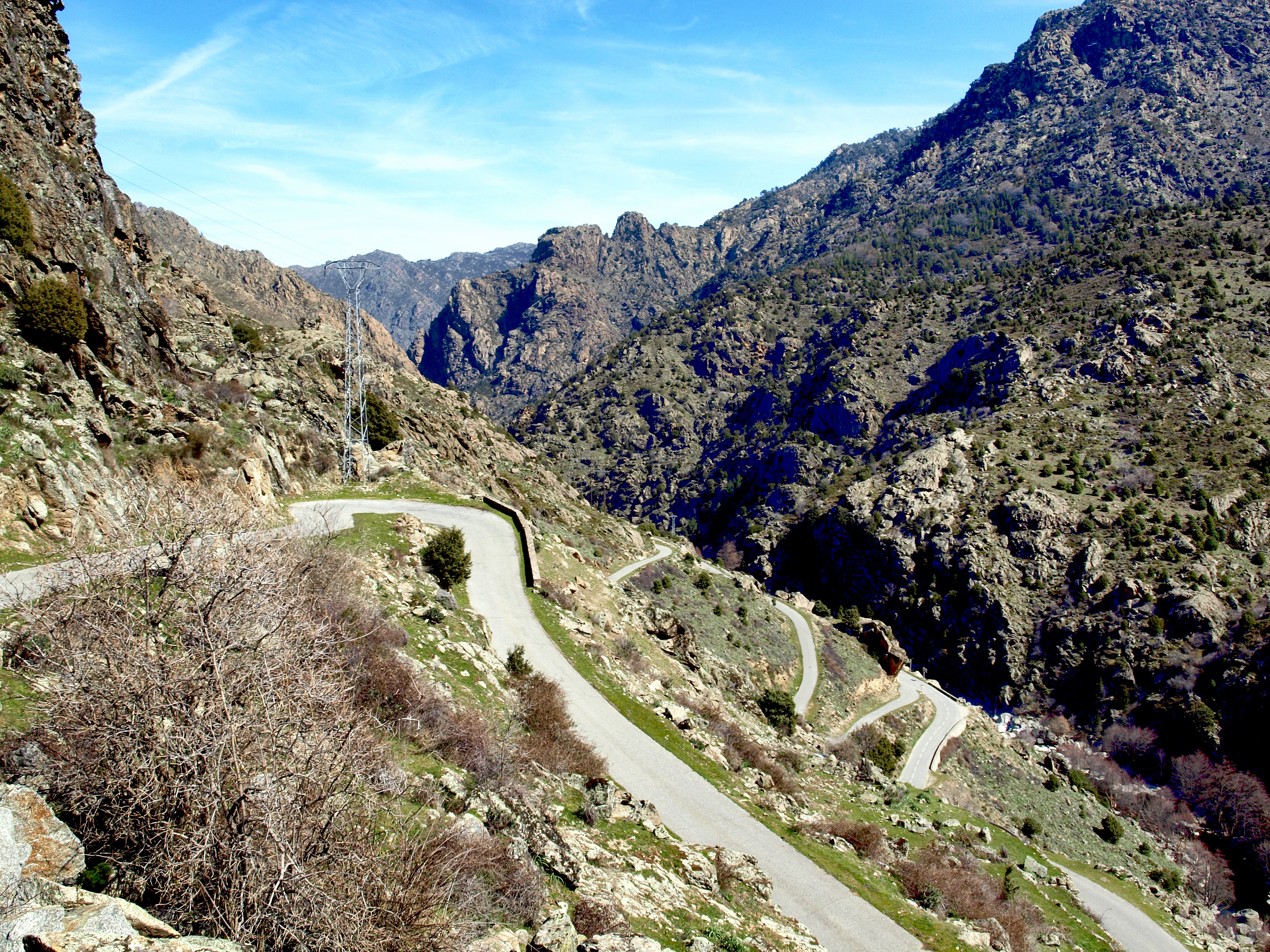 Corscia, Niolo (Corse) - Portion de la sinueuse route D718 donnant accès au village de Corscia depuis la Scala di Santa Regina